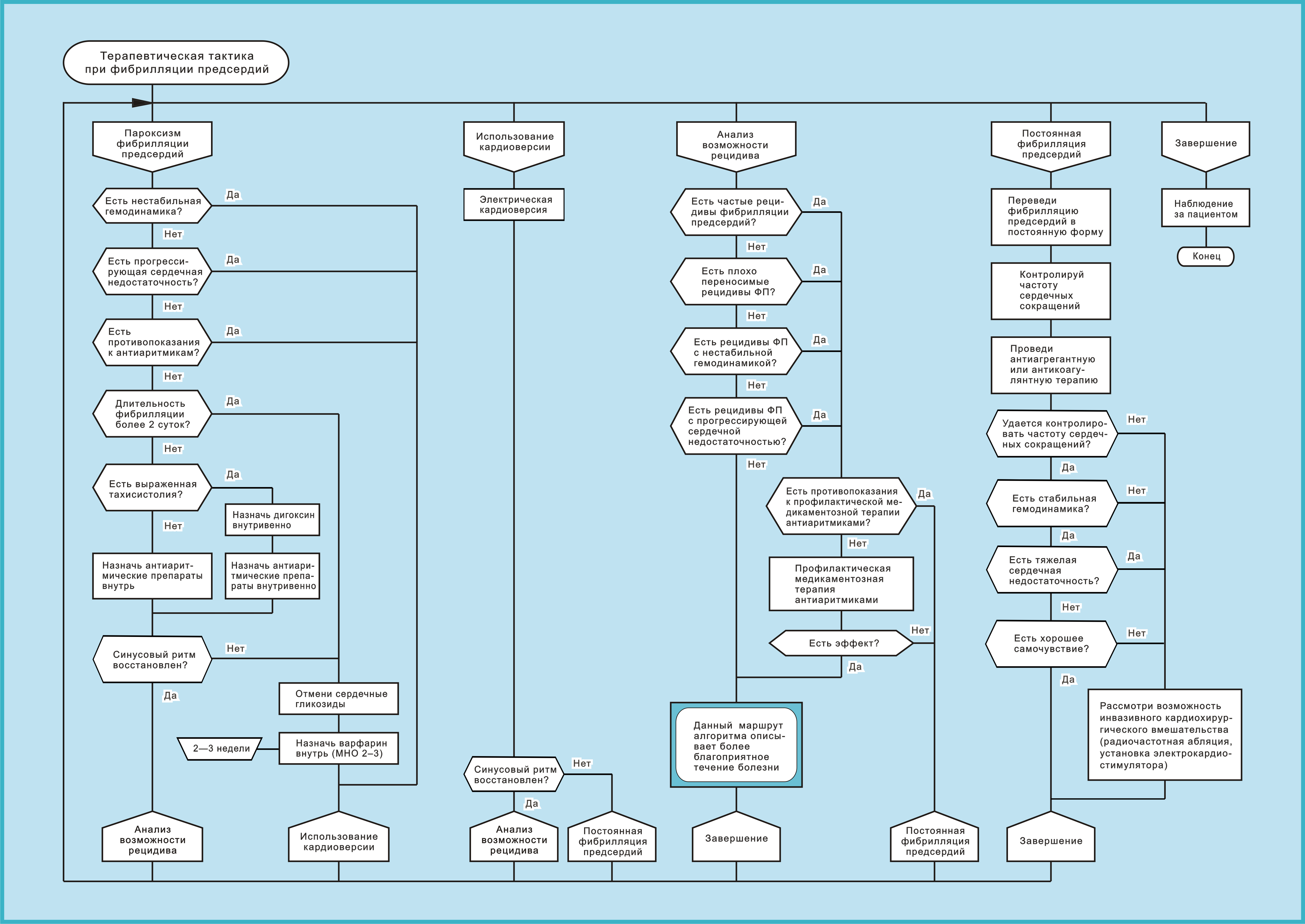 Терапевтическая тактика при фибрилляции предсердий — медицинский алгоритм на языке ДРАКОН. Алгоритм построен на основе описания, изложенного в книге: "Поликлиническая терапия. Учебник. / Под ред. проф. И.Л. Давыдкина, проф. Ю.В. Щукина. — М.: ГЭОТАР-Медиа, 2013. — 688 с. — ISBN 978-5-9704-2396-7", в разделе "Фибрилляция предсердий" на стр. 114-115. Категория:Медицинская информатика Категория:Алгоритмы Категория:Представление знаний Category:Health informatics Category:Algorithms Category:Knowledge representation Translated from